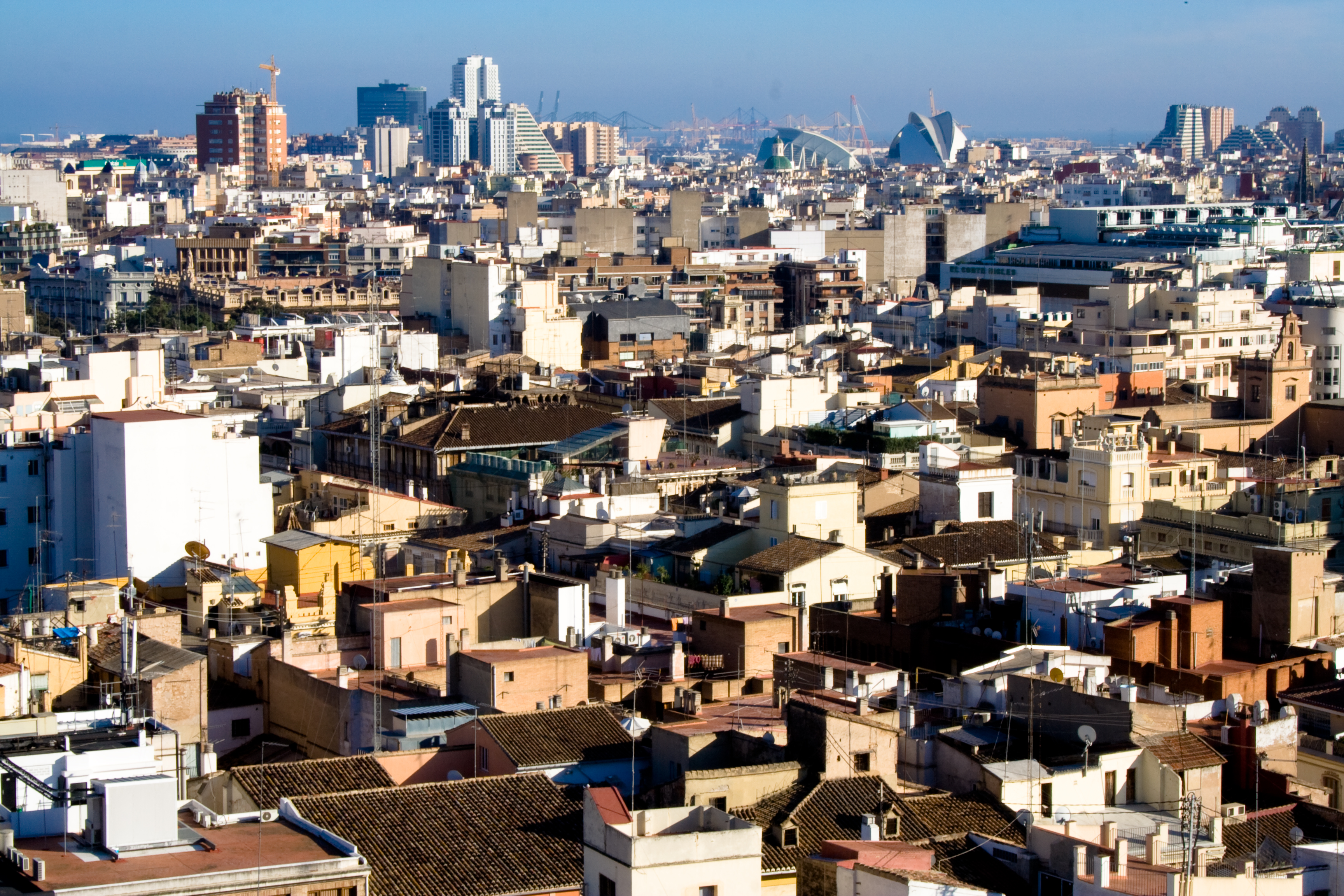 Vista de la ciudad de Valencia desde el Micalet.